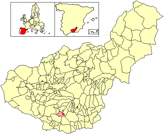 Situación de la localidad de Acebuches (en el municipio de El Pinar) respecto a la provincia de Granada, en España.